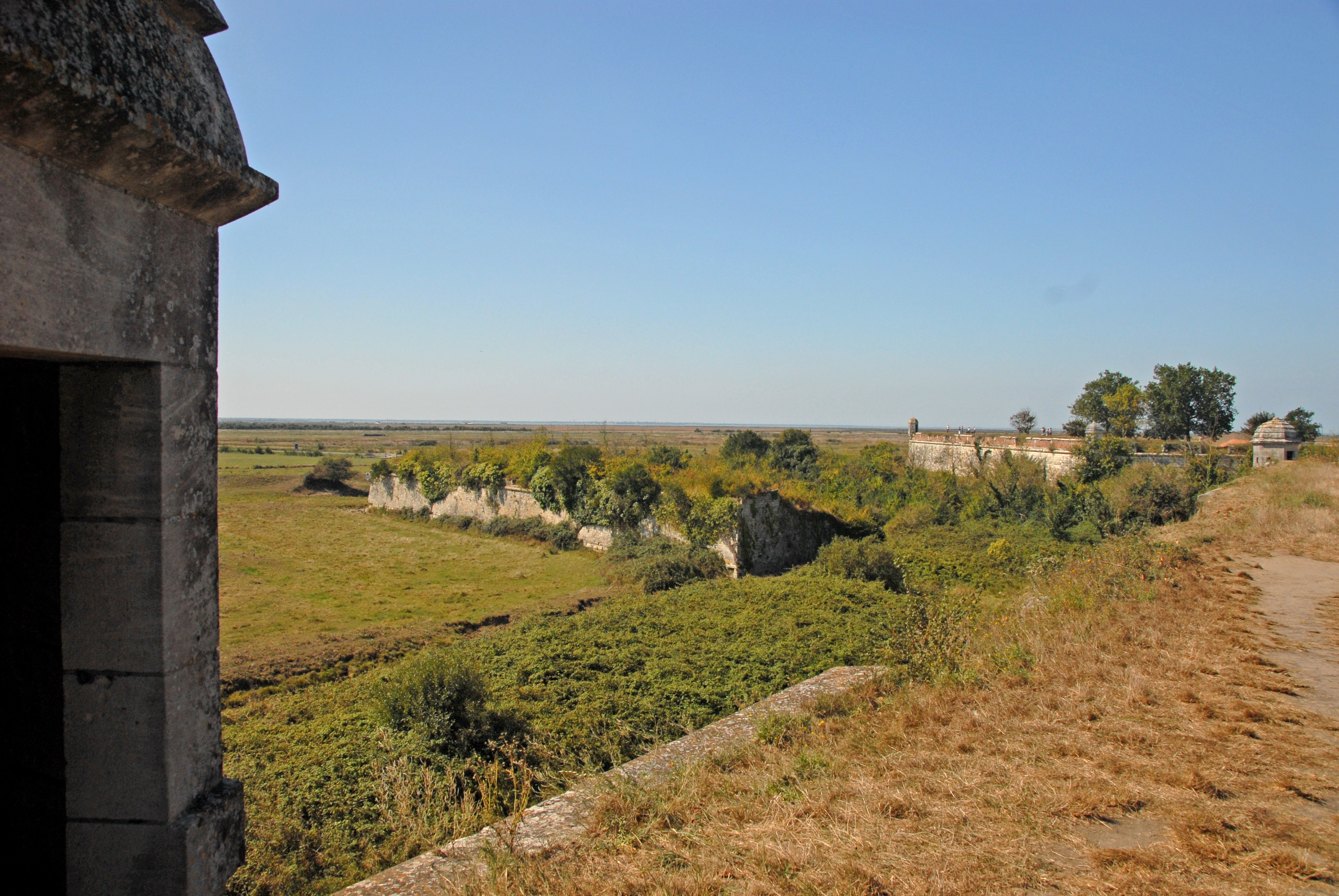 Brouage, Vorwerk, vor der Bastion d'Hiers